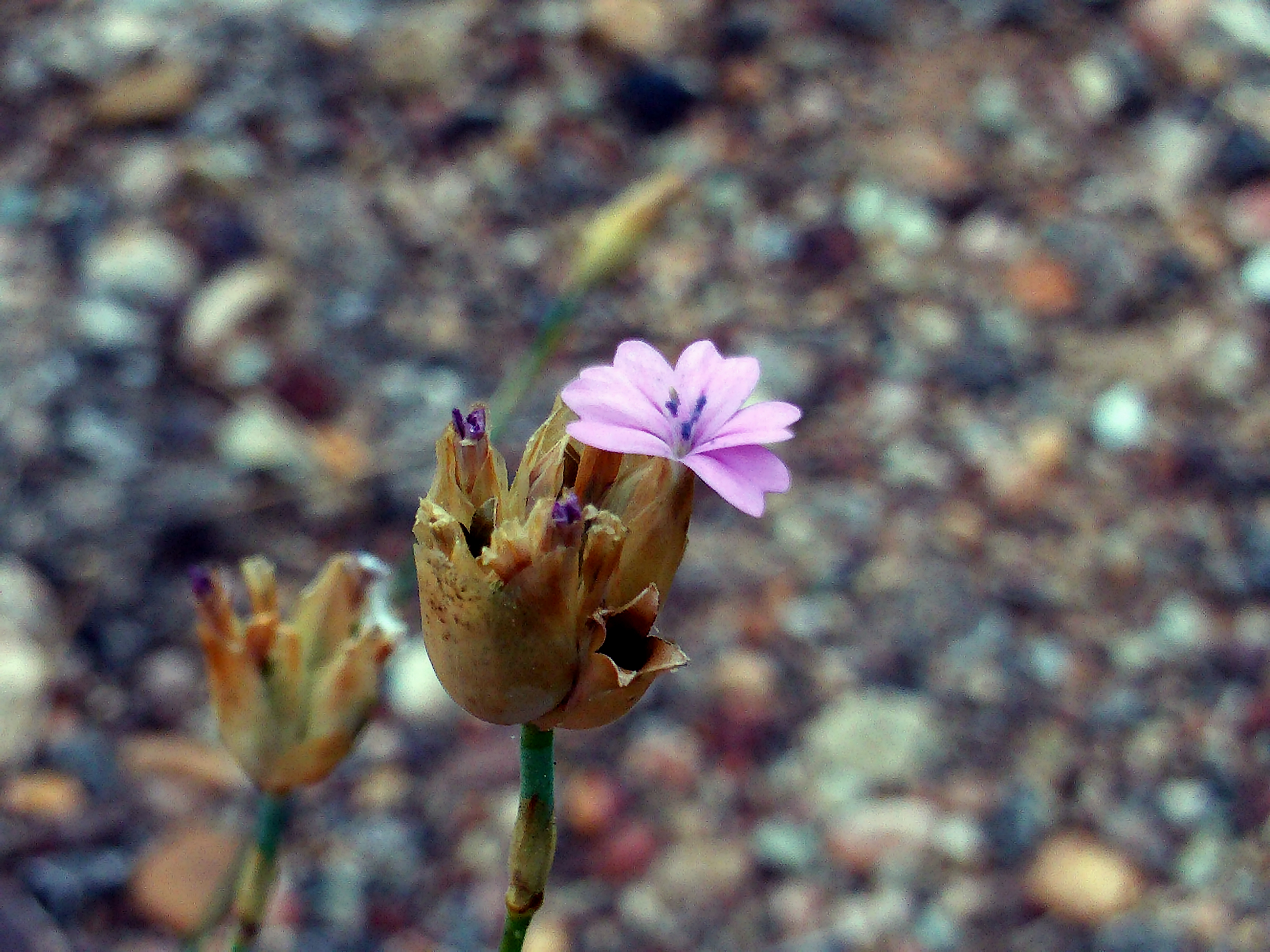 Petrorhagia nanteuilii flower close up, Dehesa Boyal de Puertollano, Spain